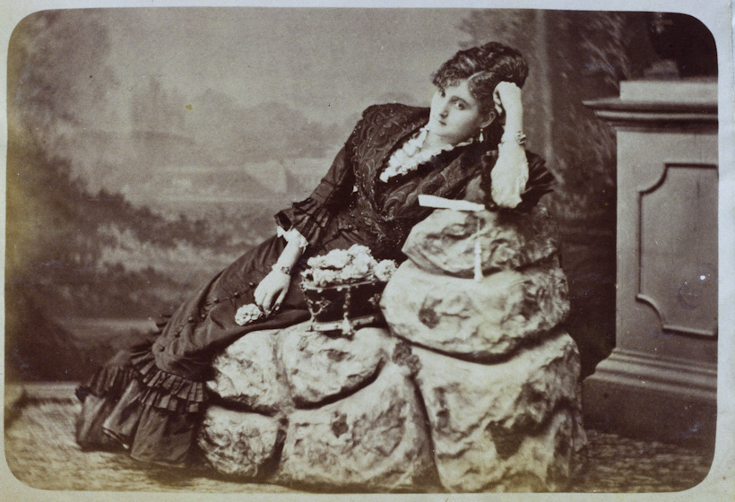 Obra que integra o acervo do Museu Paulista da USP. Coleção Militão Augusto de Azevedo.